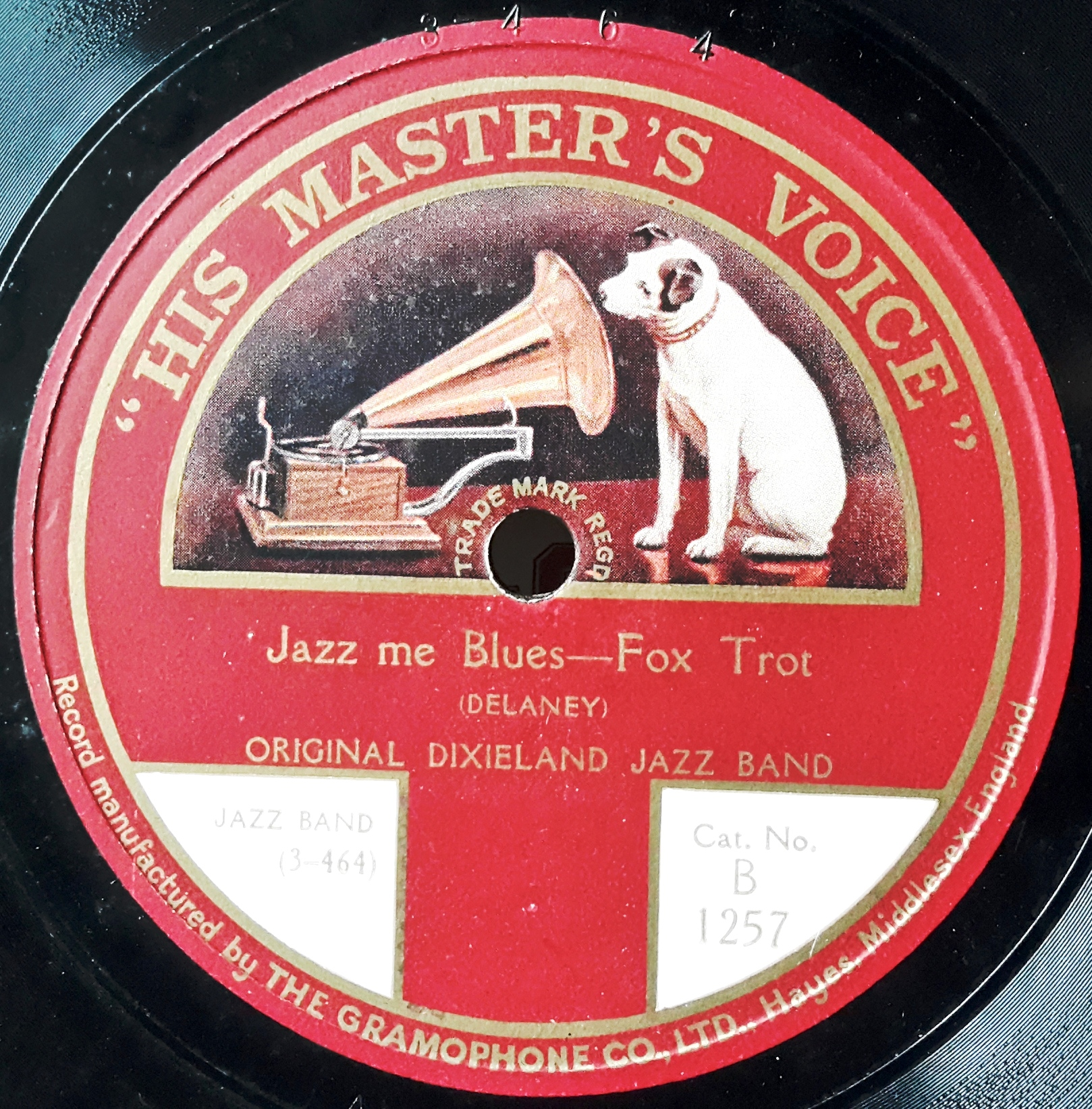 Label der britischen Marke "His Master's Voice", zeitgenössische Lizenzpressung einer amerikanischen Originalaufnahme aus den frühen 1920er Jahren der "Original Dixieland Jazz Band", frühe Jazzplatte